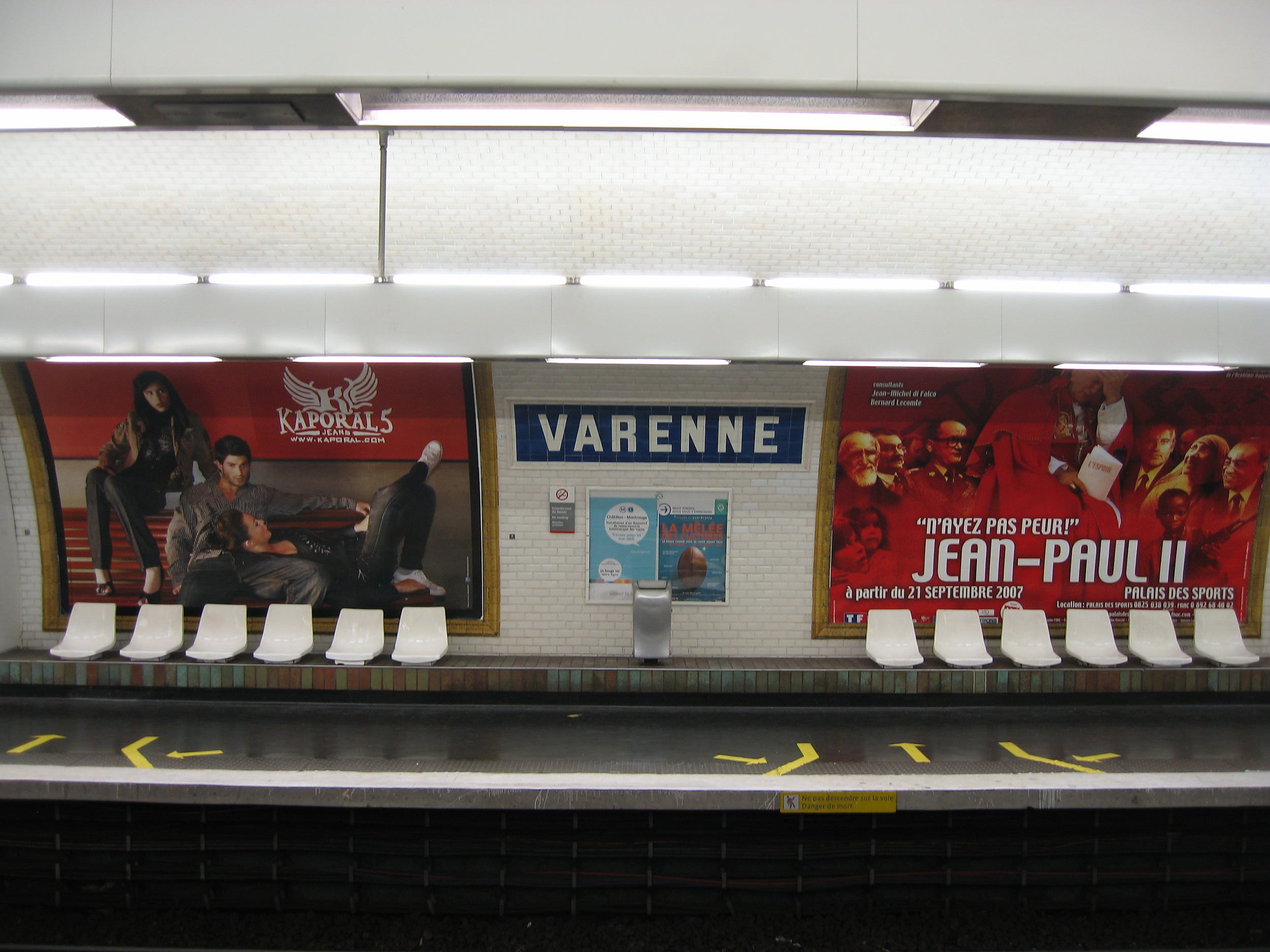 Quai direction Saint-Denis et Asnières-Gennevilliers de la station Varenne.